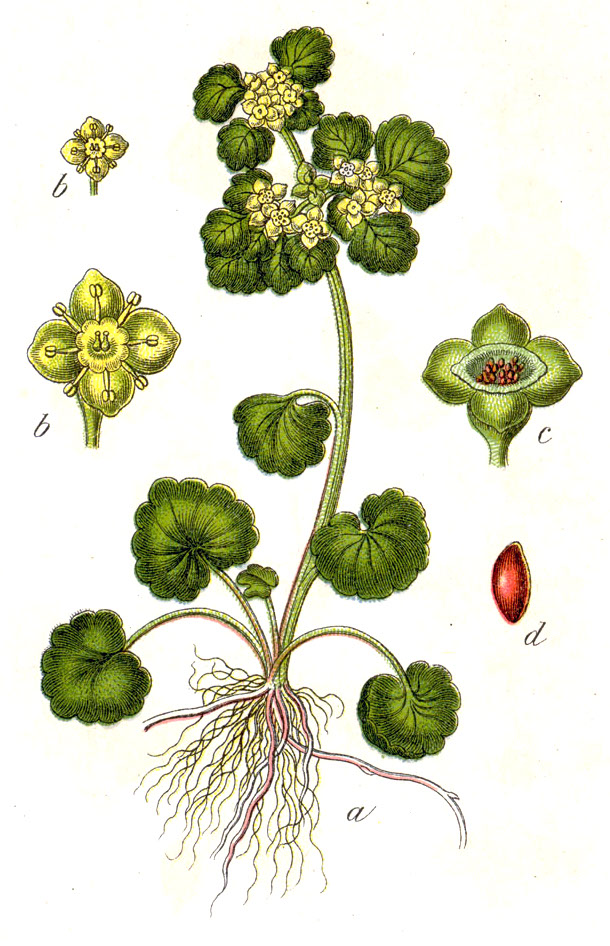 Chrysosplenium alternifolium L. Original Caption Echtes Goldmilzkraut, Chrysosplenium alternifolium